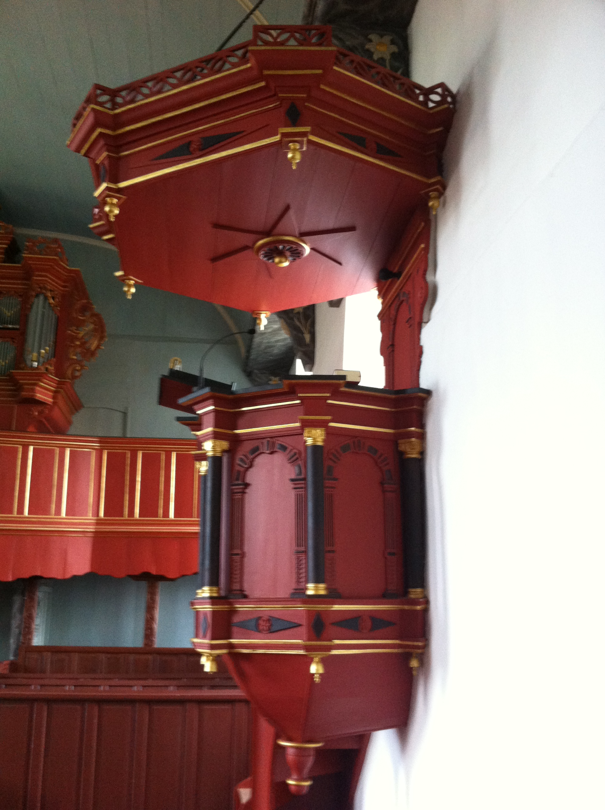 Kanzel der Kirche in Midlum, Rheiderland, Landkreis Leer, Niedersachsen, Deutschland